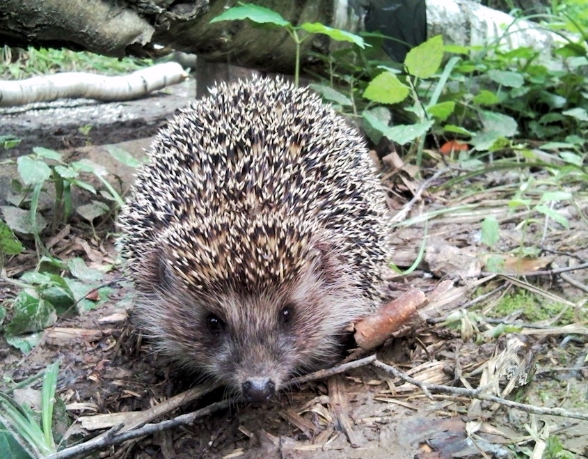 Ёж в Бюрюлёвском дендропарке